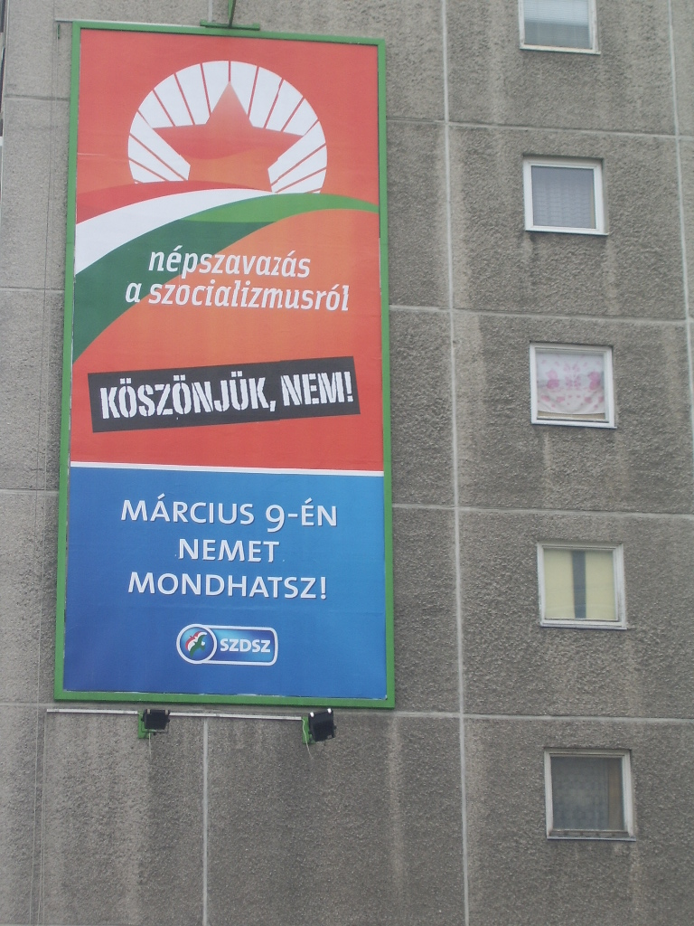 SZDSZ poster on 2008 hungarian referendum. Az SZDSZ 2008-as népszavazási plakátja.